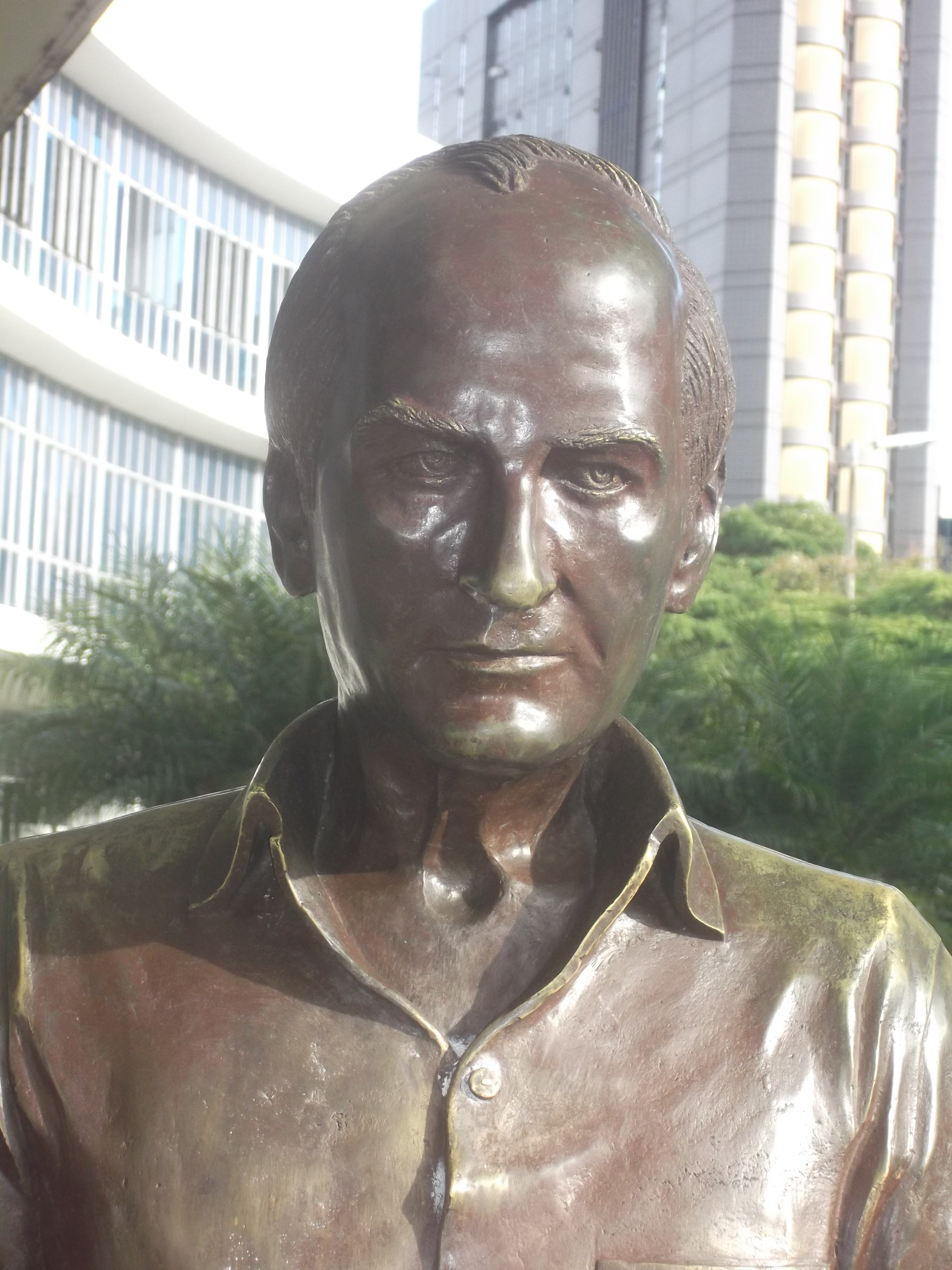 O Encontro Marcado, Biblioteca Pública Estadual Luiz de Bessa, Belo Horizonte, Brasil